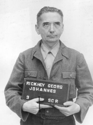 Haftbogenfoto des Angeklagten Georg Johannes Rickhey (25.08.1898 in Hildesheim - 1966), SS-Obersturmführer, Generaldirektor des Mittelwerkes, im Dachauer Dora-Prozess ("Case No. 000-50-37 Dora") am 30.12.1947 freigesprochen.